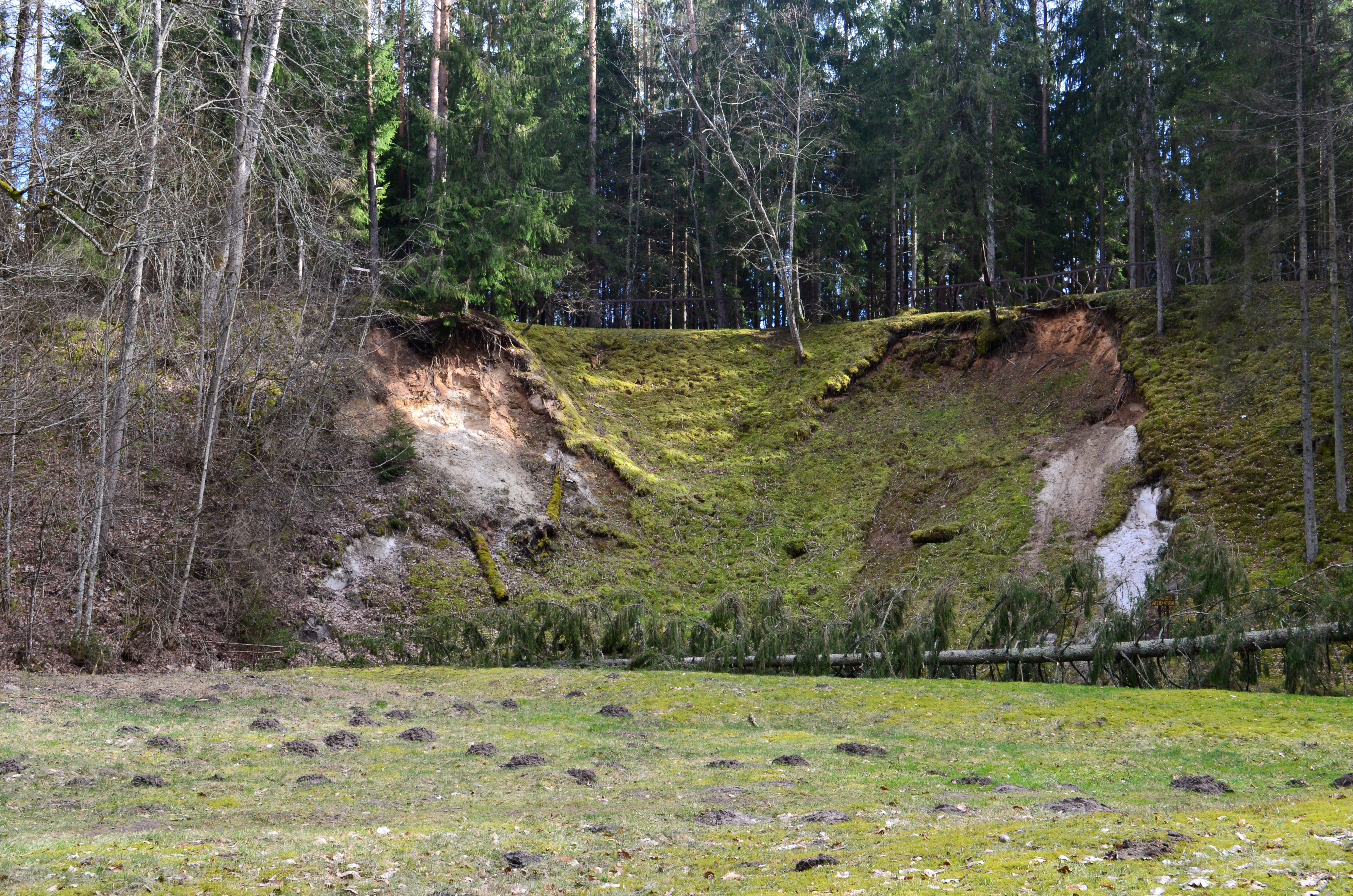 Variaus atodanga, Niūronių apylinkės, Anykščių raj.